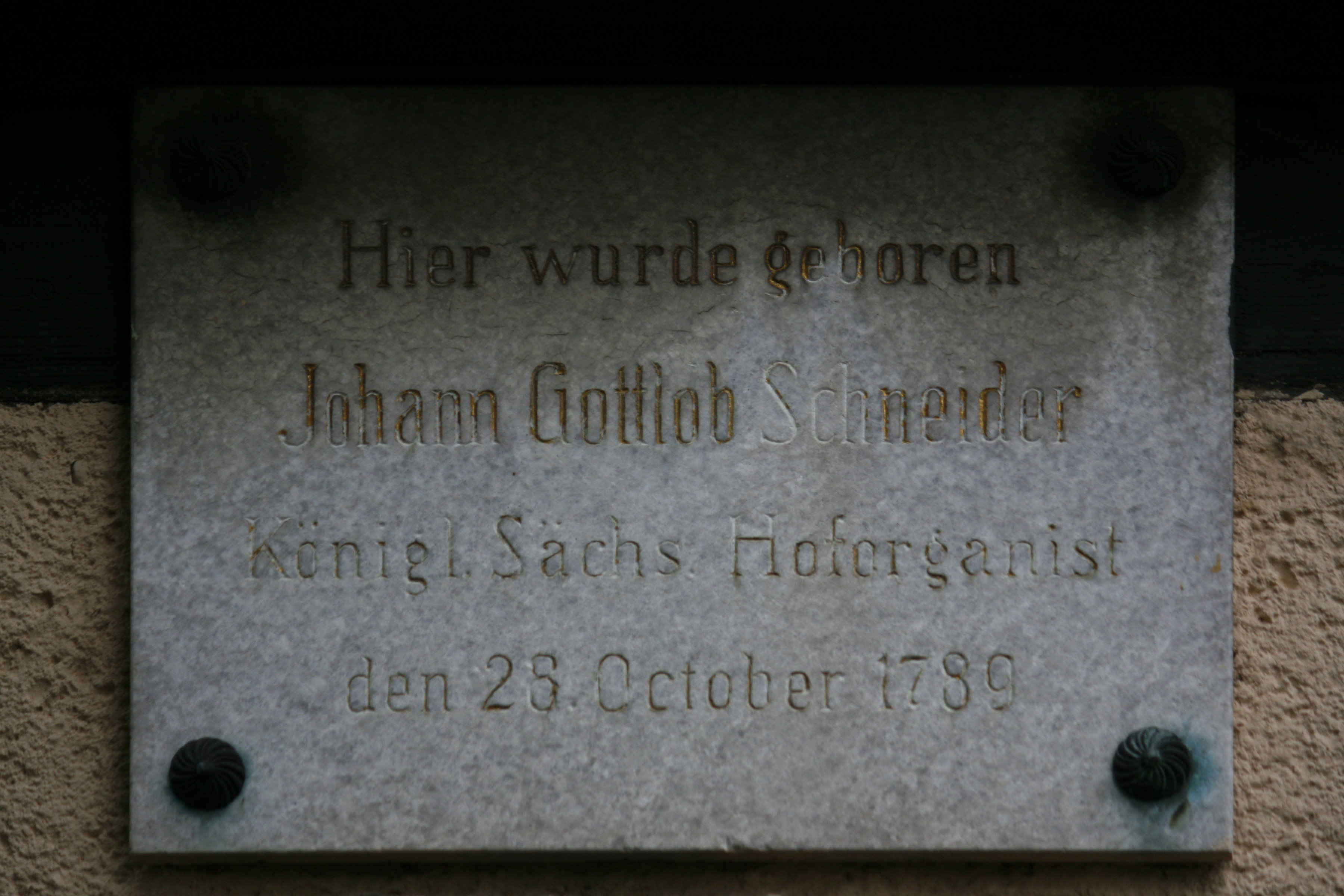 Neugersdorf